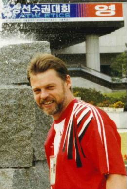 Marek Biskupski, mistrzostwa świata